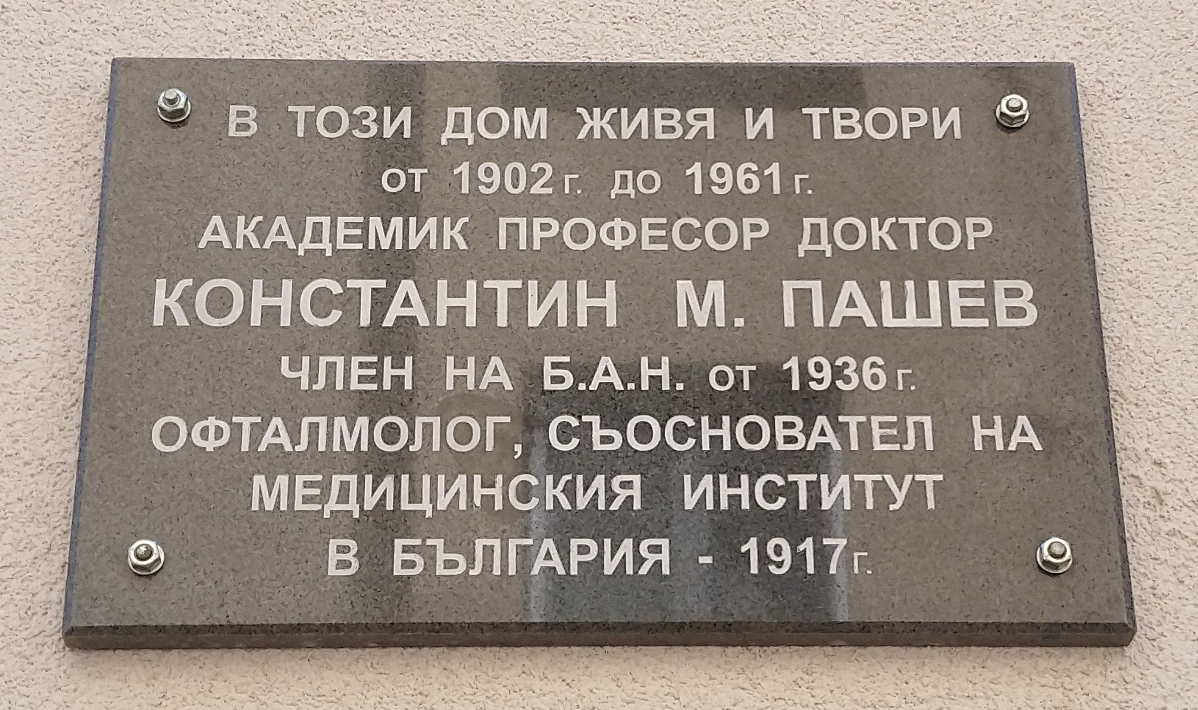 Паметна плоча на лекаря акад. Константин Пашев, ул. Хан Аспарух 48, София